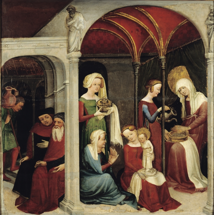 Peintre actif à Strasbourg au début du XVe siècle La Nativité de la Vierge, vers 1410 Huile sur panneau - 115 x 114 cm Strasbourg, Musée de l’Œuvre Notre-Dame